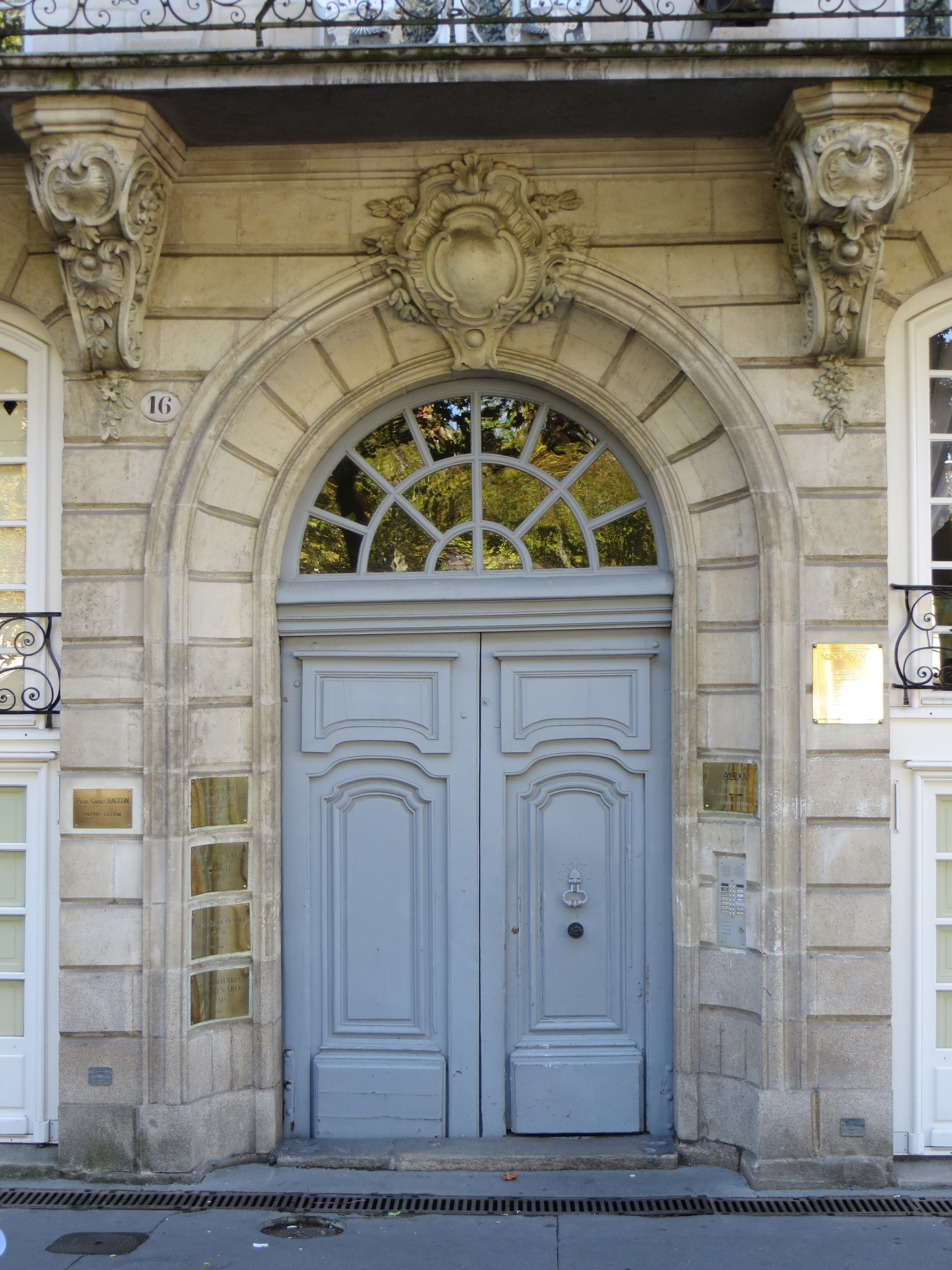 Temple du Goût entrée côté quai